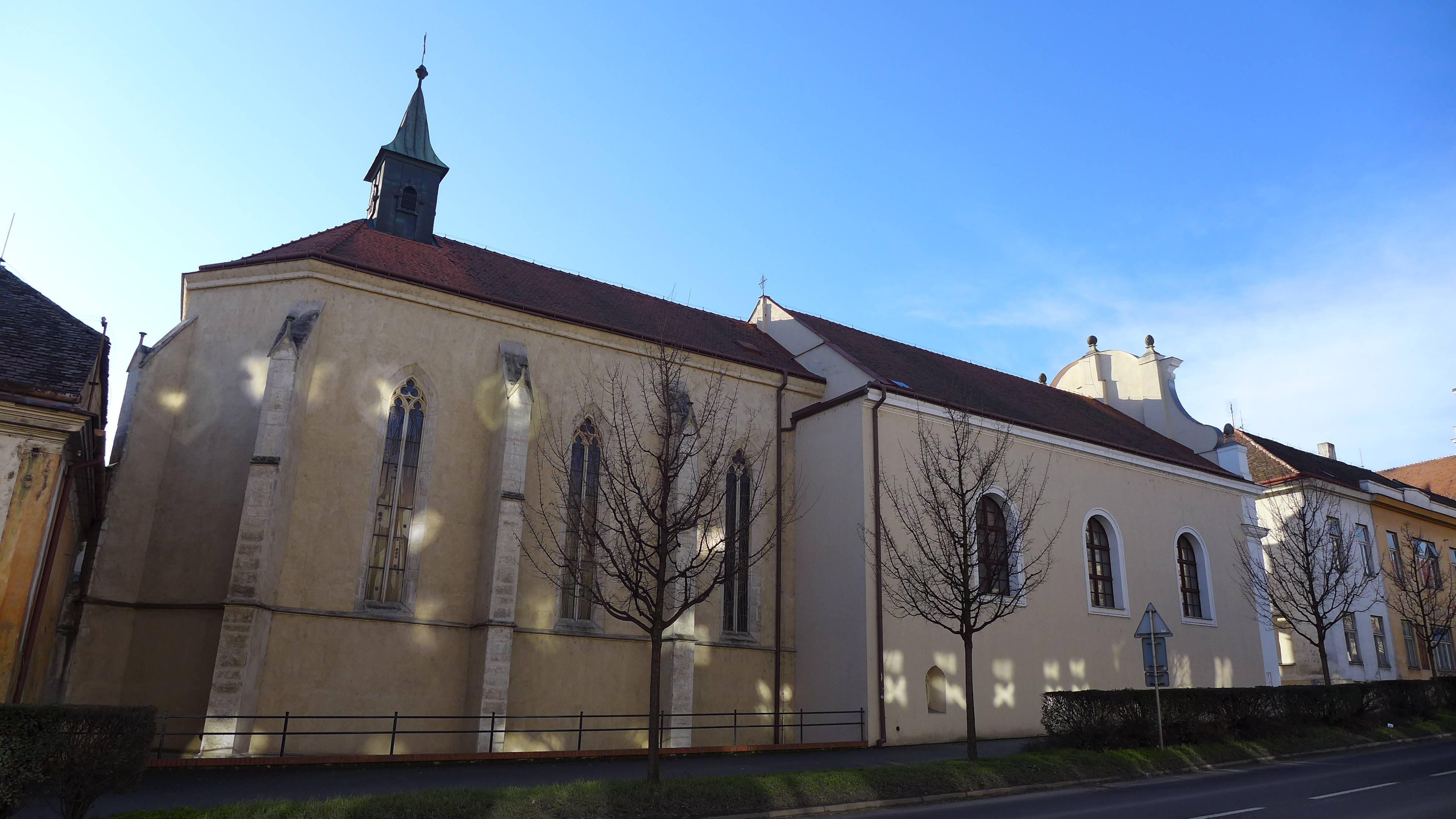 Špitál, Vídeňská třída 588/6, Znojmo.